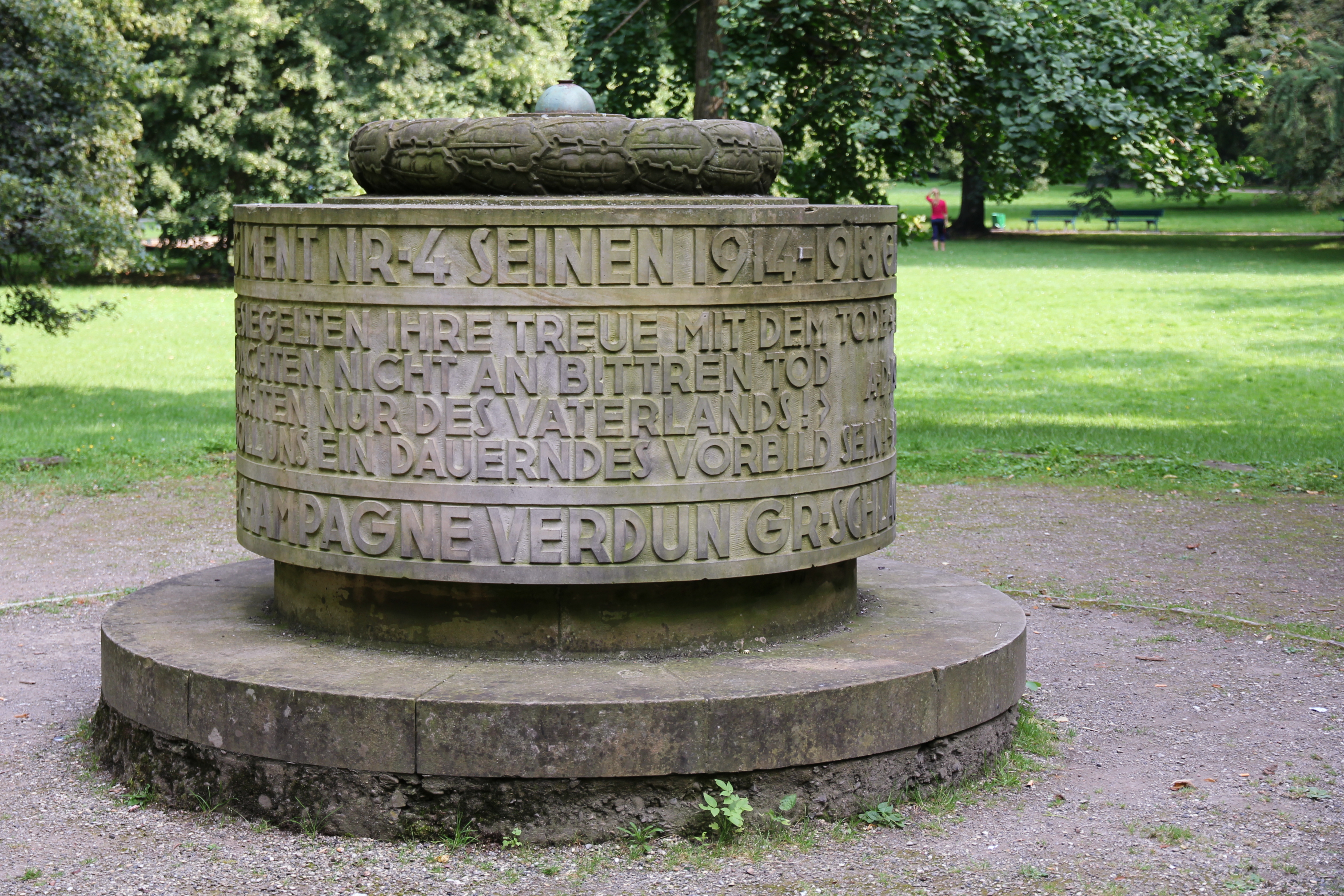 Kriegerdenkmal im Georgengarten in Hannover für die gefallenen Soldaten des Reserve-Ersatz-Regiments Nr. 4. Inscription/Inschrift: DAS RESERVE-ERSATZ-REGIMENT NR.4 SEINEN 1914-1918 GEFALLENEN HELDEN + --- 1664 OFFIZIERE UND MANNSCHAFTEN DES REGIMENTS BESIEGELTEN IHRE TREUE MIT DEM TODE + A.D.1935 HANS KRÖGER IHR HELDENMUETIGES STERBEN WAR NICHT UMSONST! ES SOLL UNS EIN DAUERNDES VORBILD SEIN! + --- GR-SCHLACHT IN FRANKREICH FLANDERN SOMME AISNE-CHAMPAGNE VERDUN